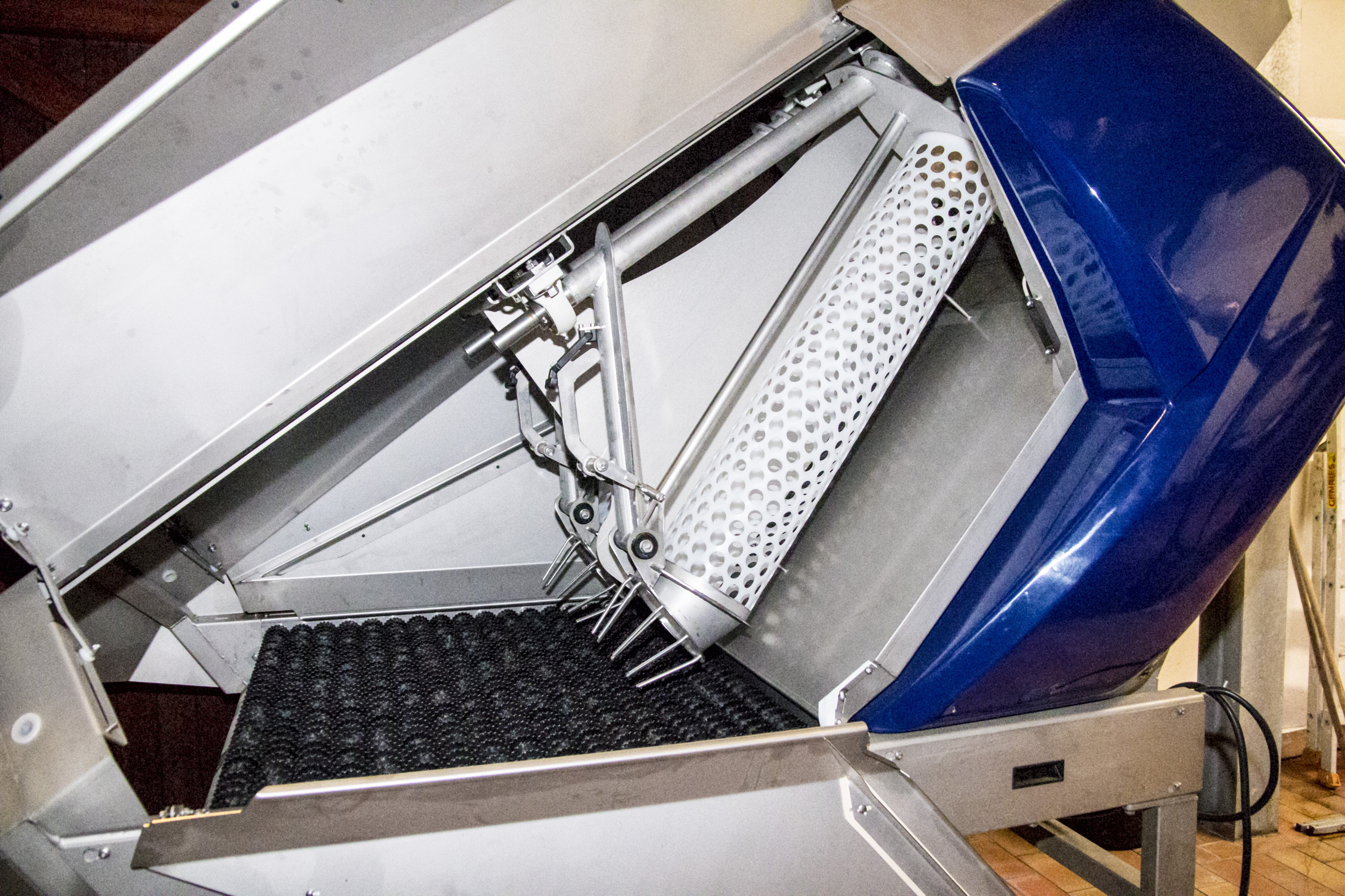 Érafloir pendulaire "Delta Oscillys" de l'entreprise Bucher-Vaslin